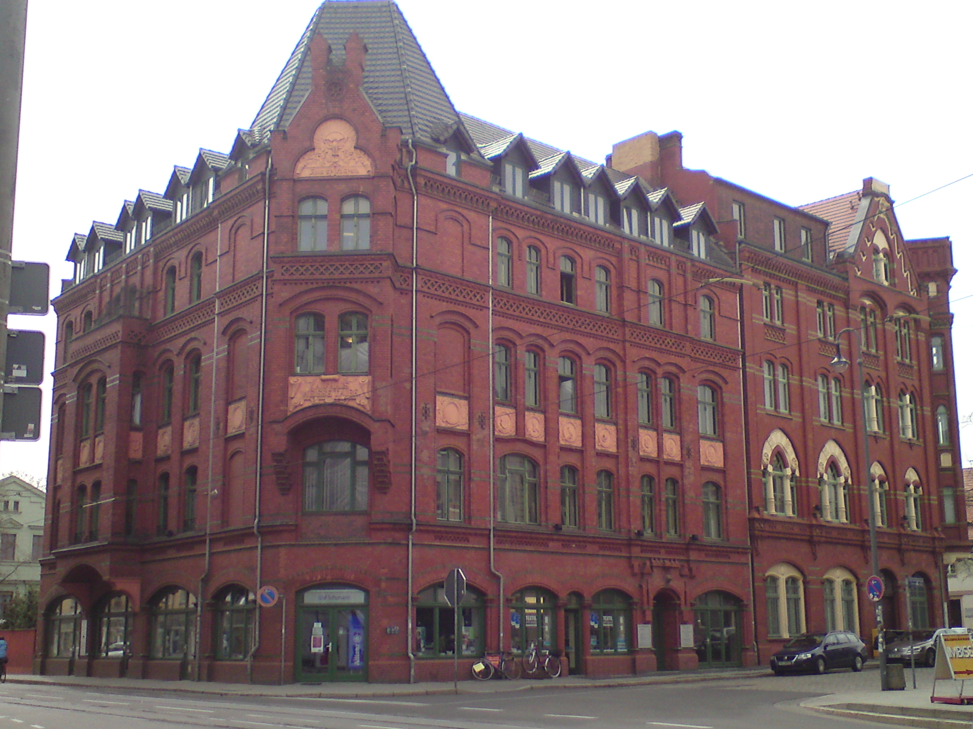 Rudolf-Breitscheid-Straße 1-2 Kaufhaus und Hoterestaurant "Weiße Taube"